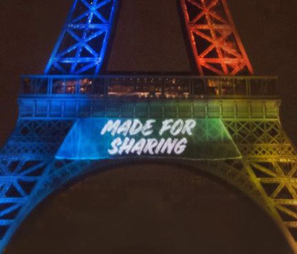 Slogan pour les Jeux olympiques 2024 à Paris affiché sur la tour Eiffel.